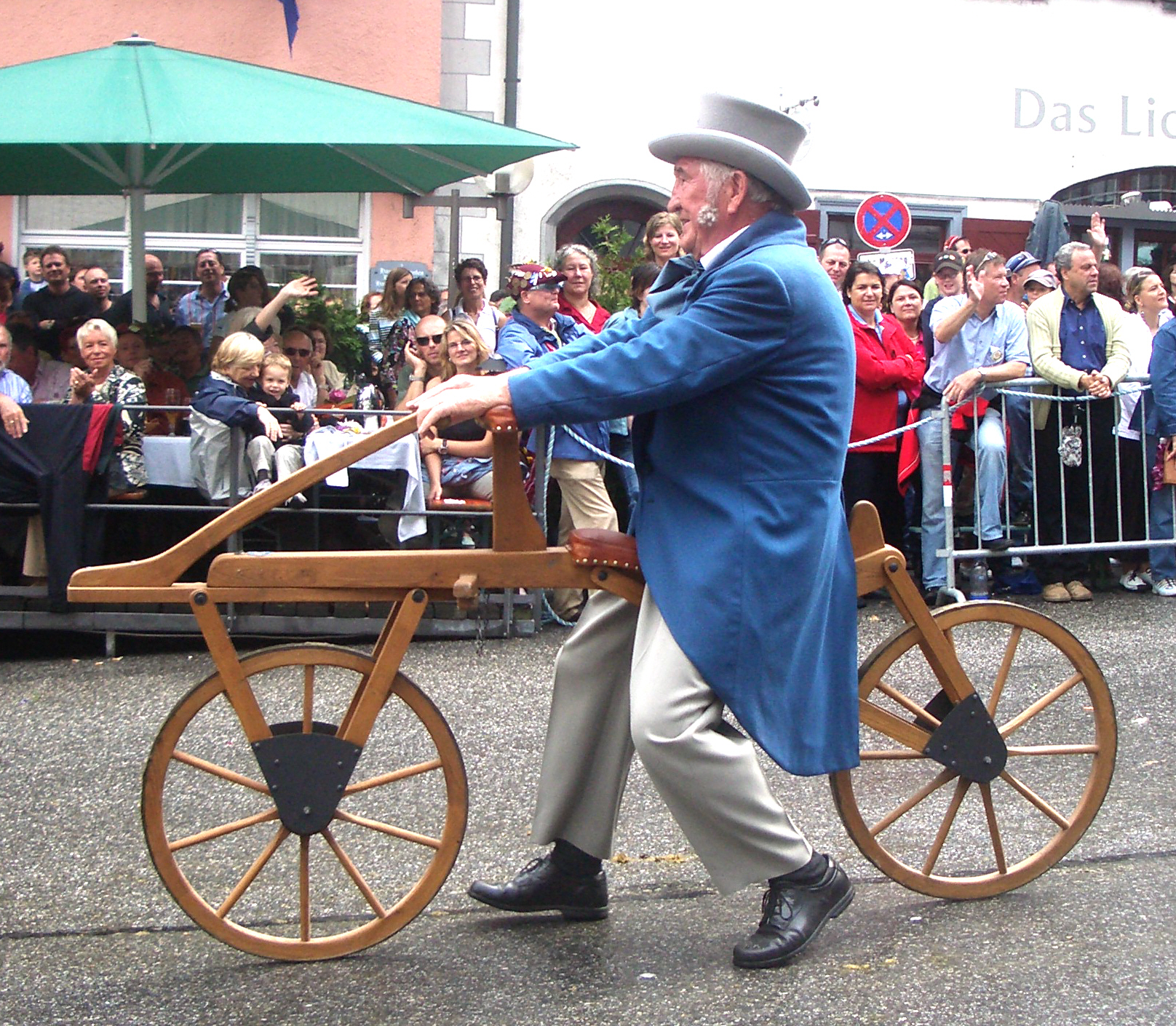 Ravensburg, Germany: Rutenfest, Festzug am Rutenmontag, Draisine